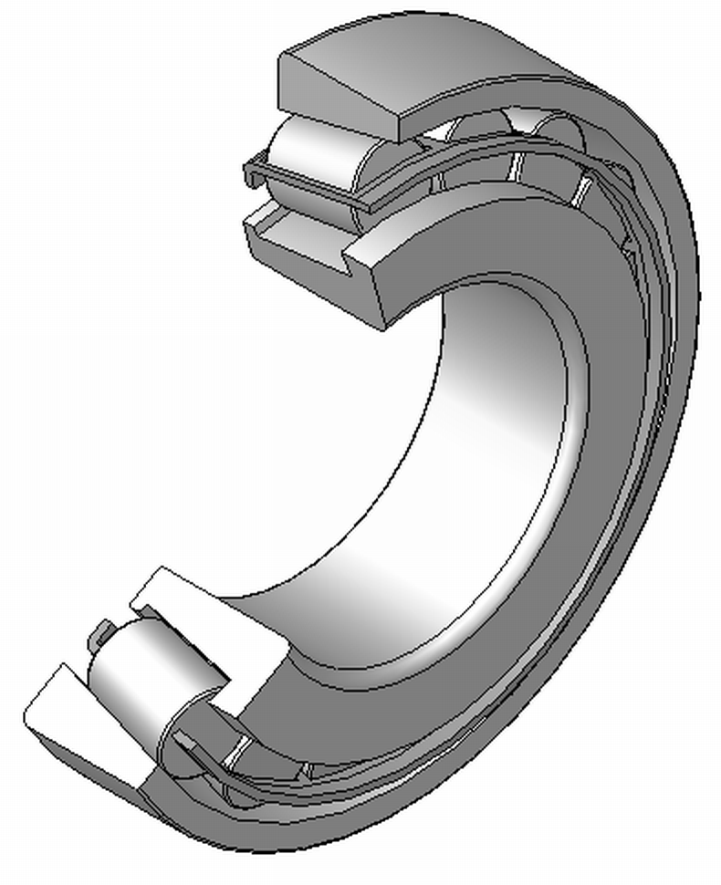 Kegelrollenlager, mit Blechkaefig aus Stahl, zerlegbar, 120°Schnitt, Hinweis: Innenaufbau des Lagers (insbesondere des Kaefigs) variiert je nach Hersteller und Baugroesse rolling contact bearings